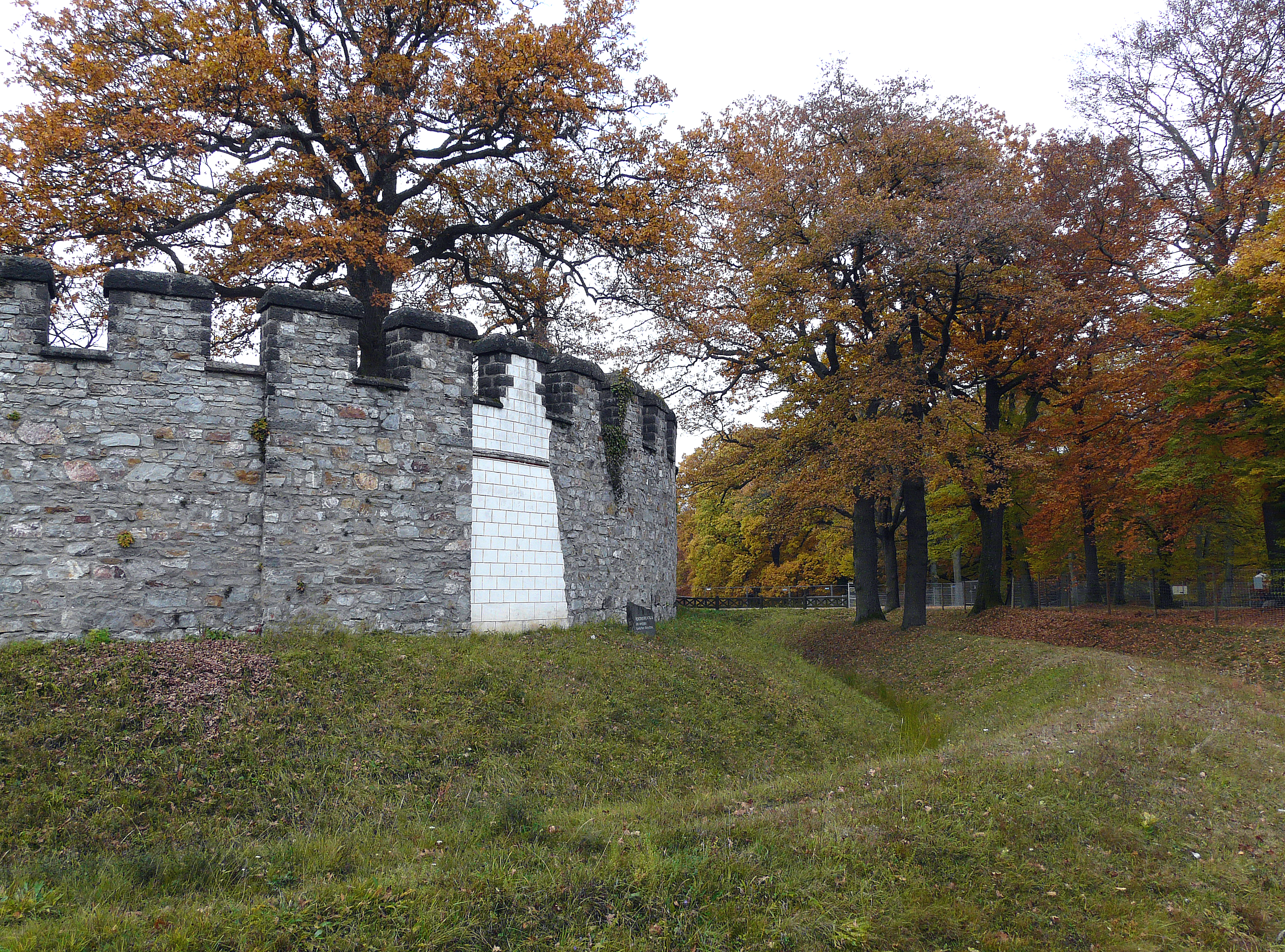 Scheinquaderanstrich auf der Außenmauer des Saalburgkastells